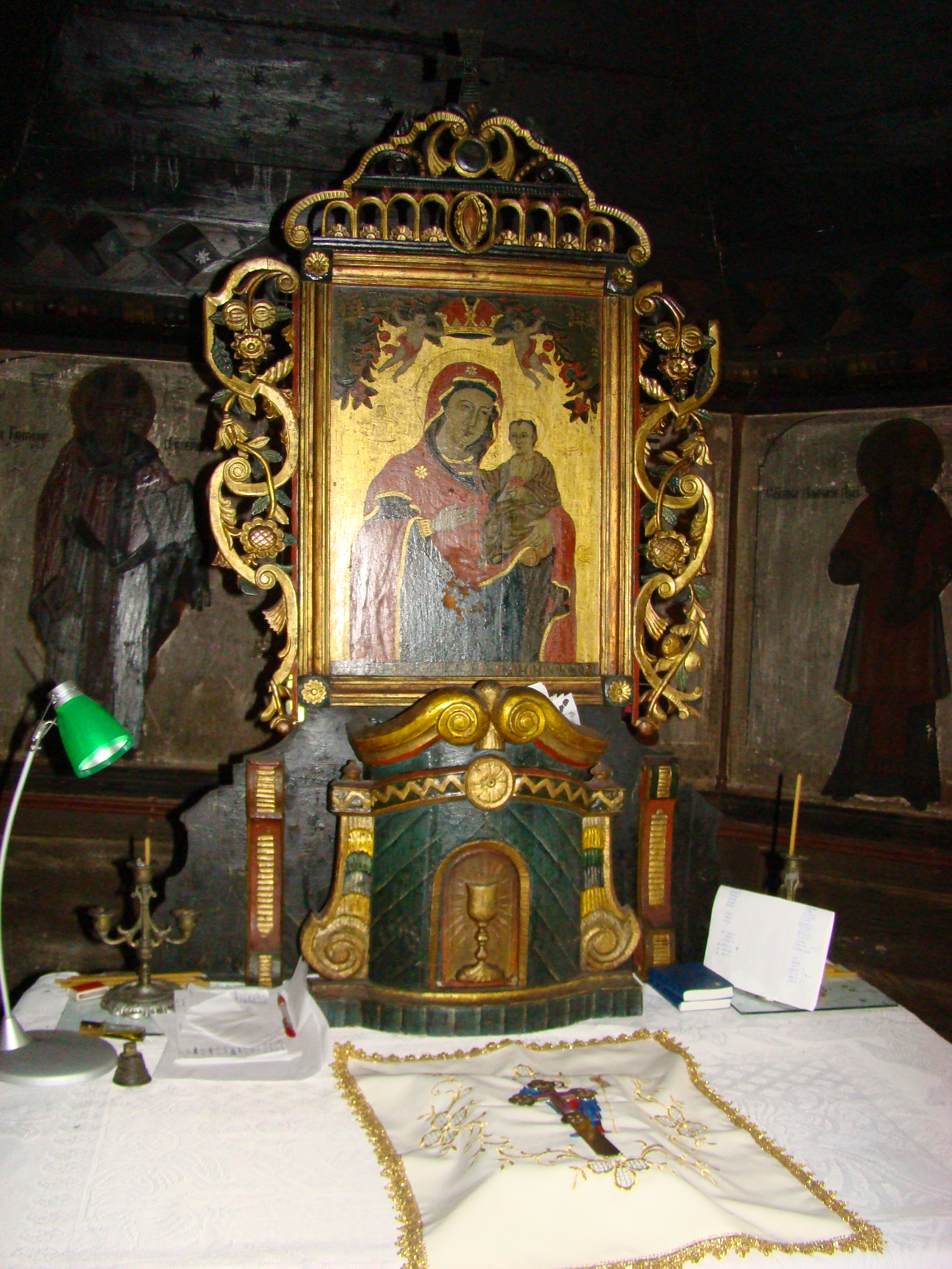 Biserica „Sf. Arhangheli Mihail și Gavriil” din Răstoci”, județul Sălaj